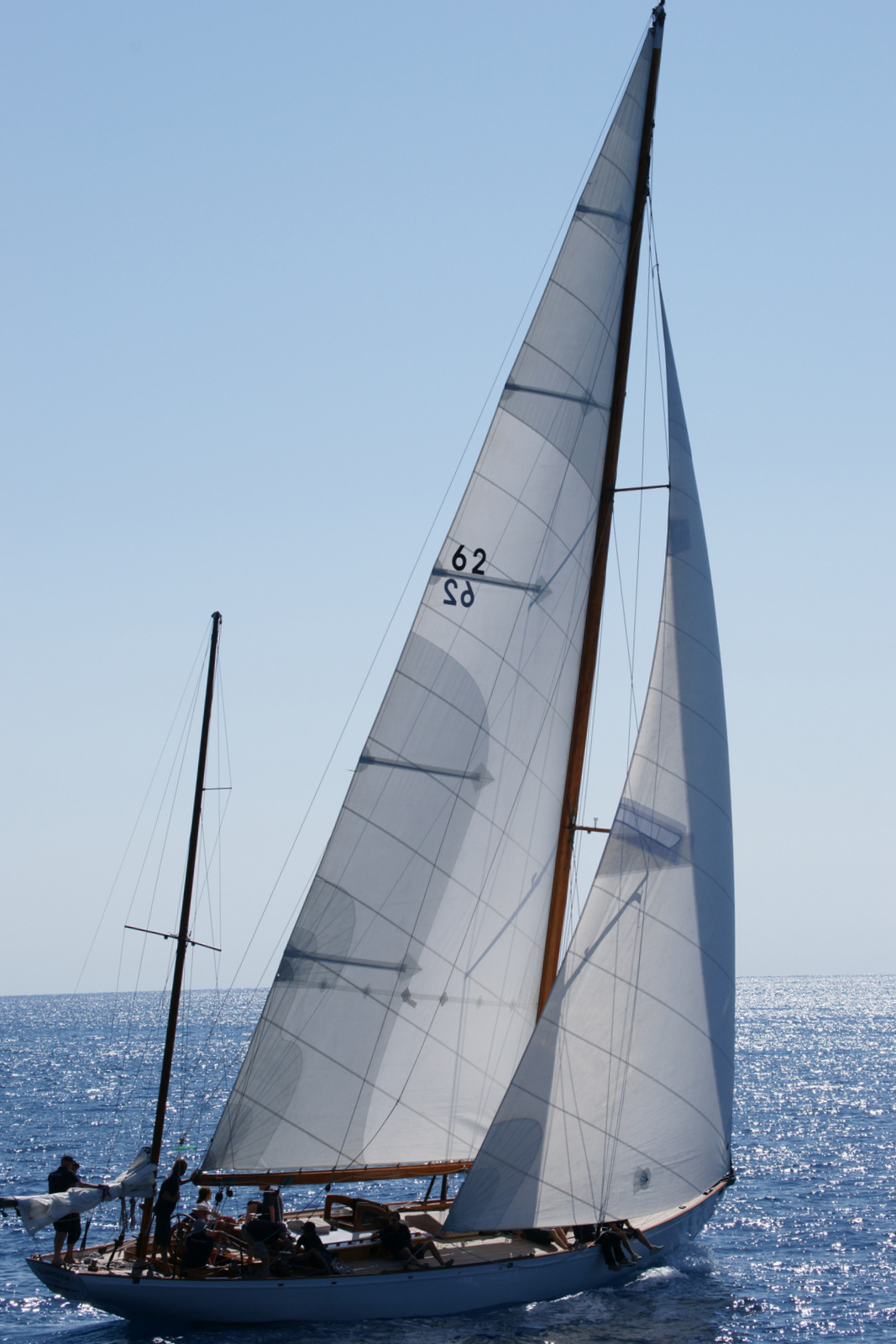 Manitou by Olin Stephens, Régates Nice 2012.jpg